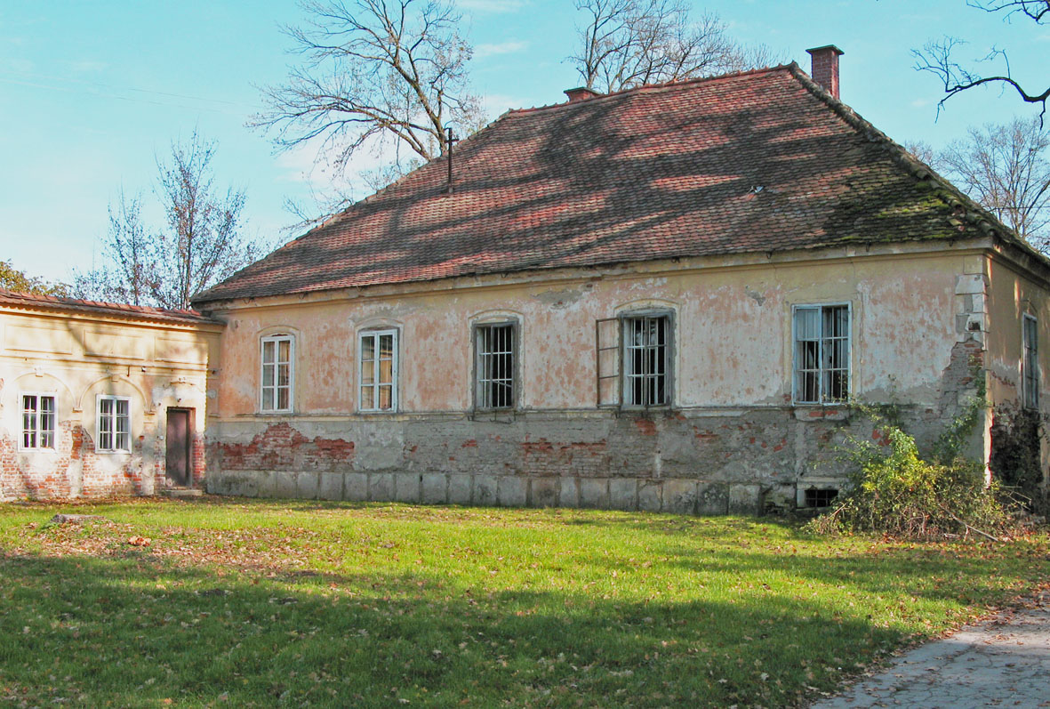 Schloss Tišina/Slowenien